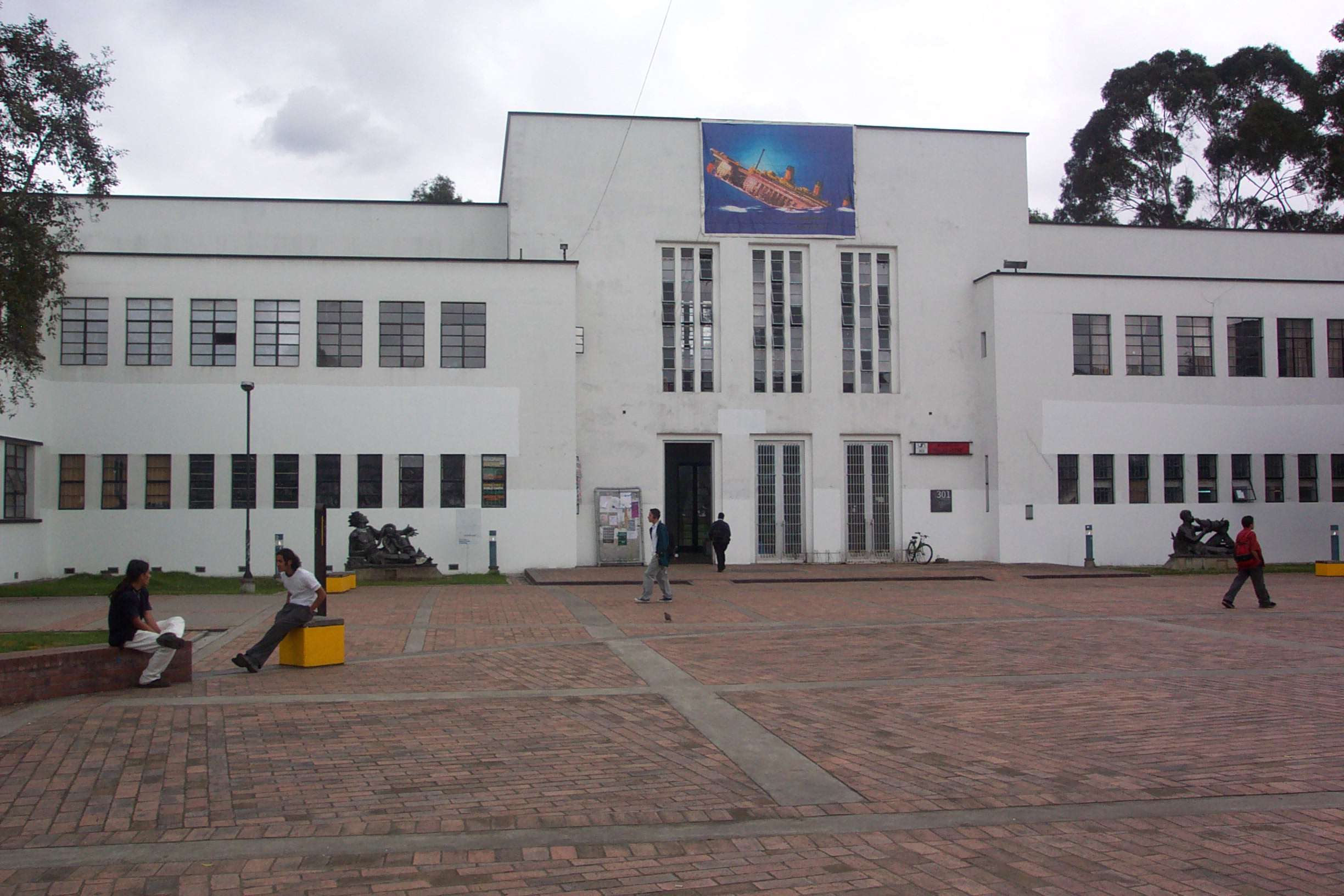 Edificio de Bellas Artes - Universidad Nacional de Colombia